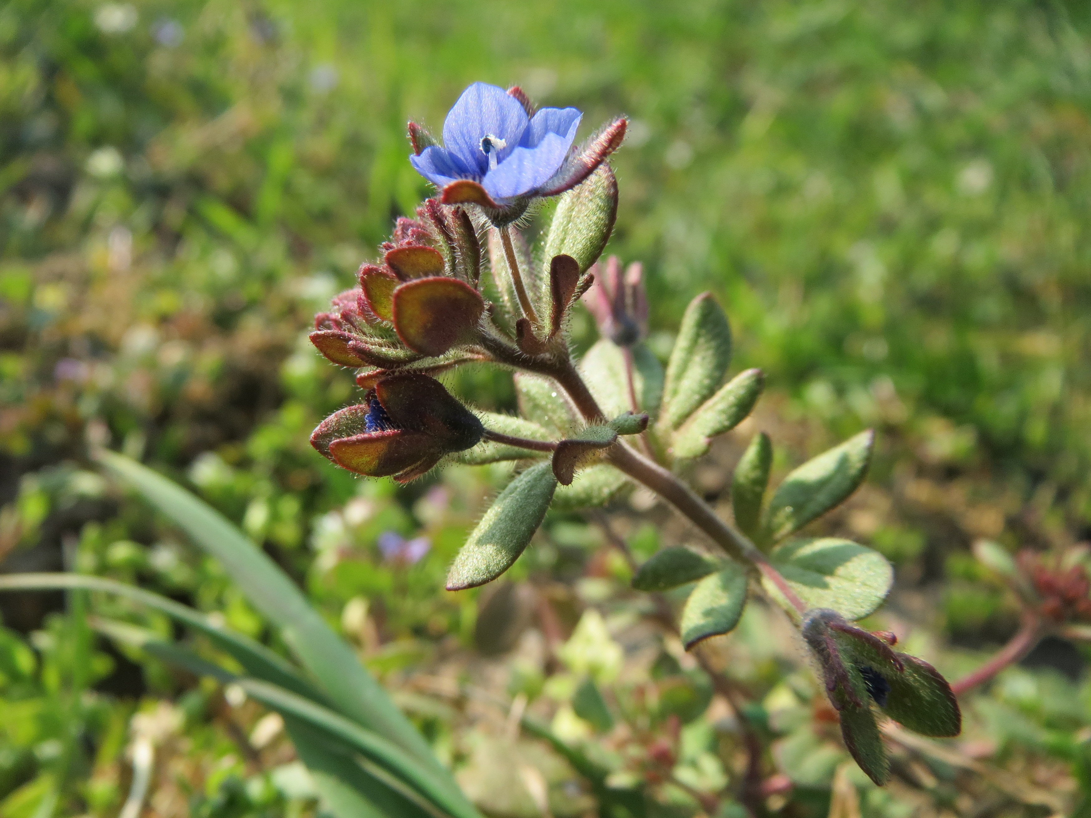 Dreiteilige Ehrenpreis (Veronica triphyllos) bei Reilingen